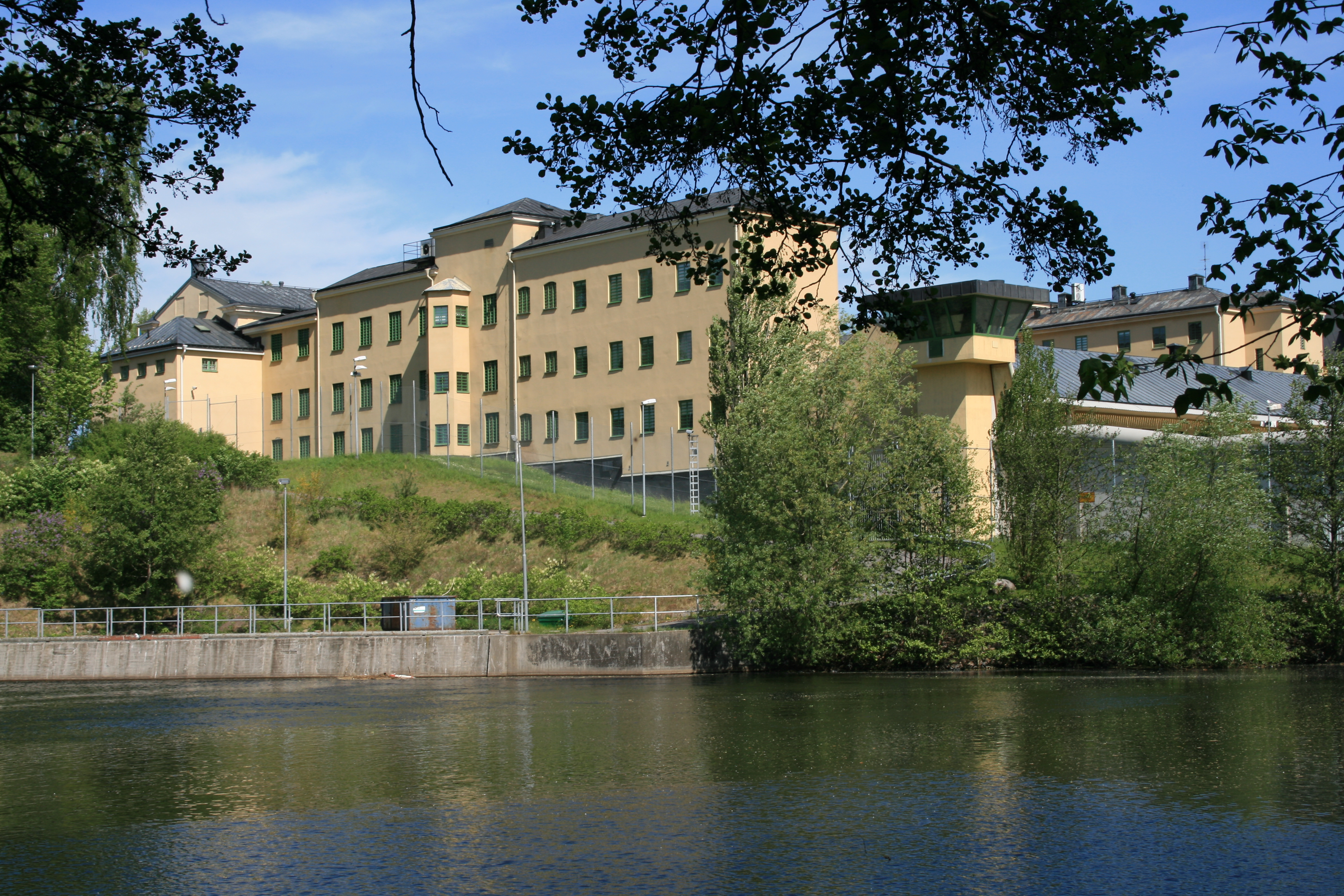 Anstalten Norrköping